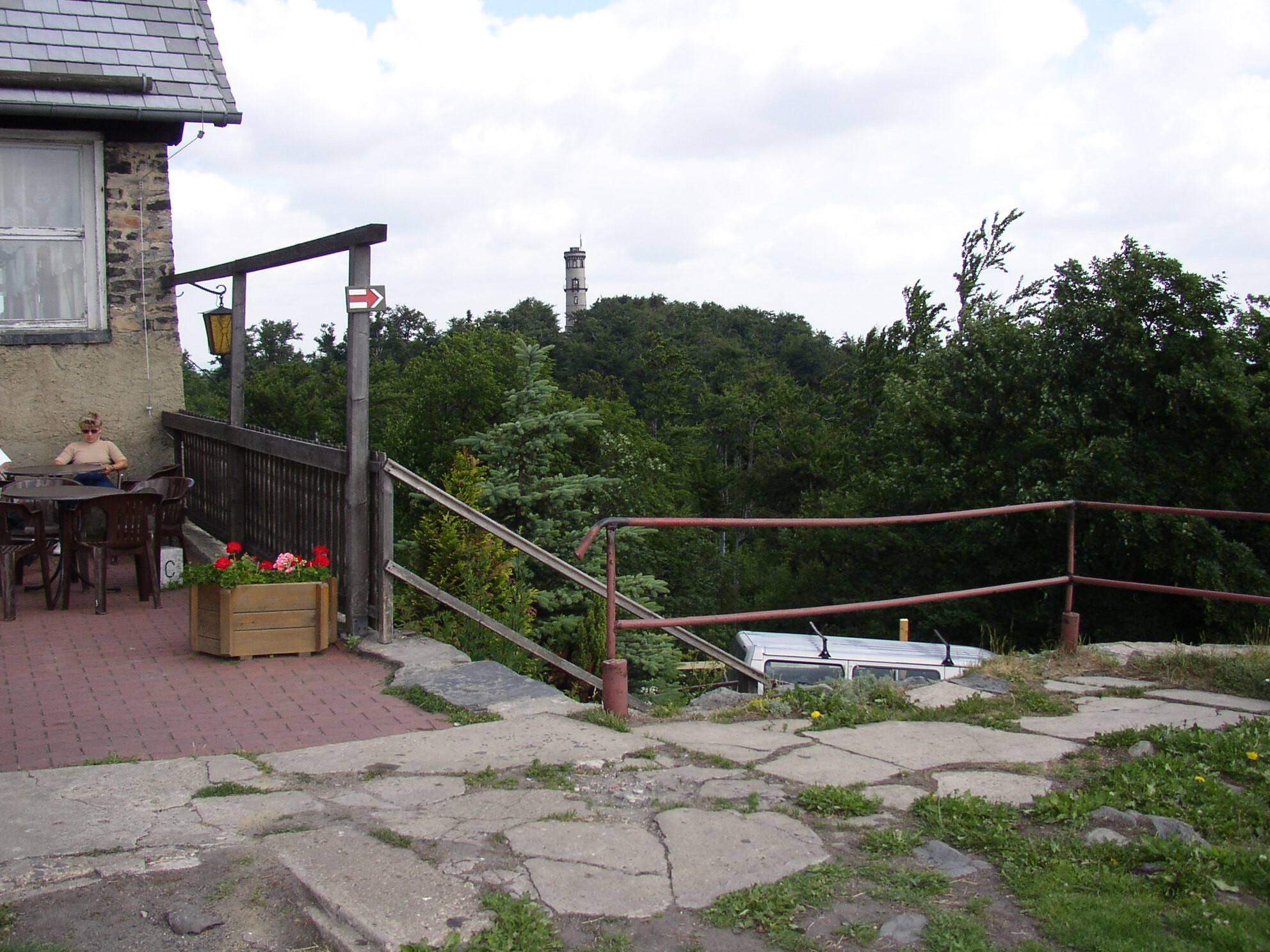 Hvozd - vrchol